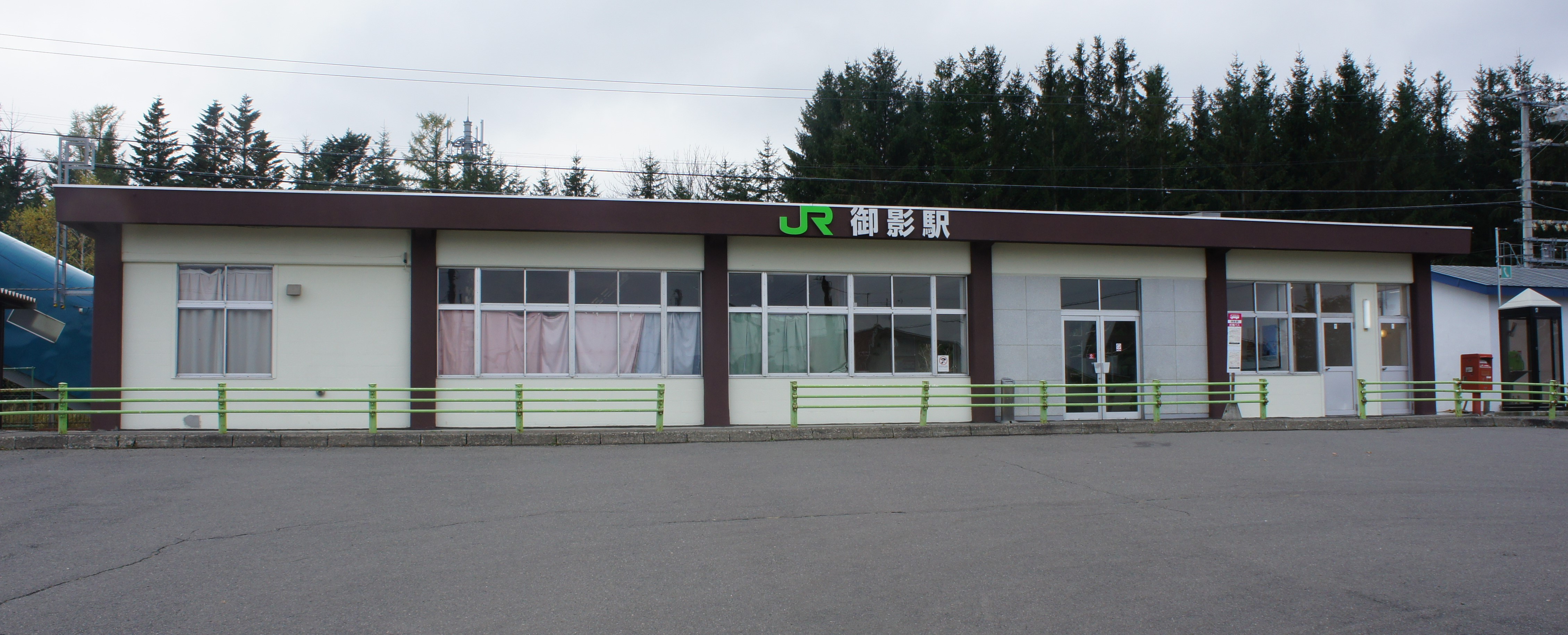 JR根室本線・御影駅の駅舎 Sony NEX-3